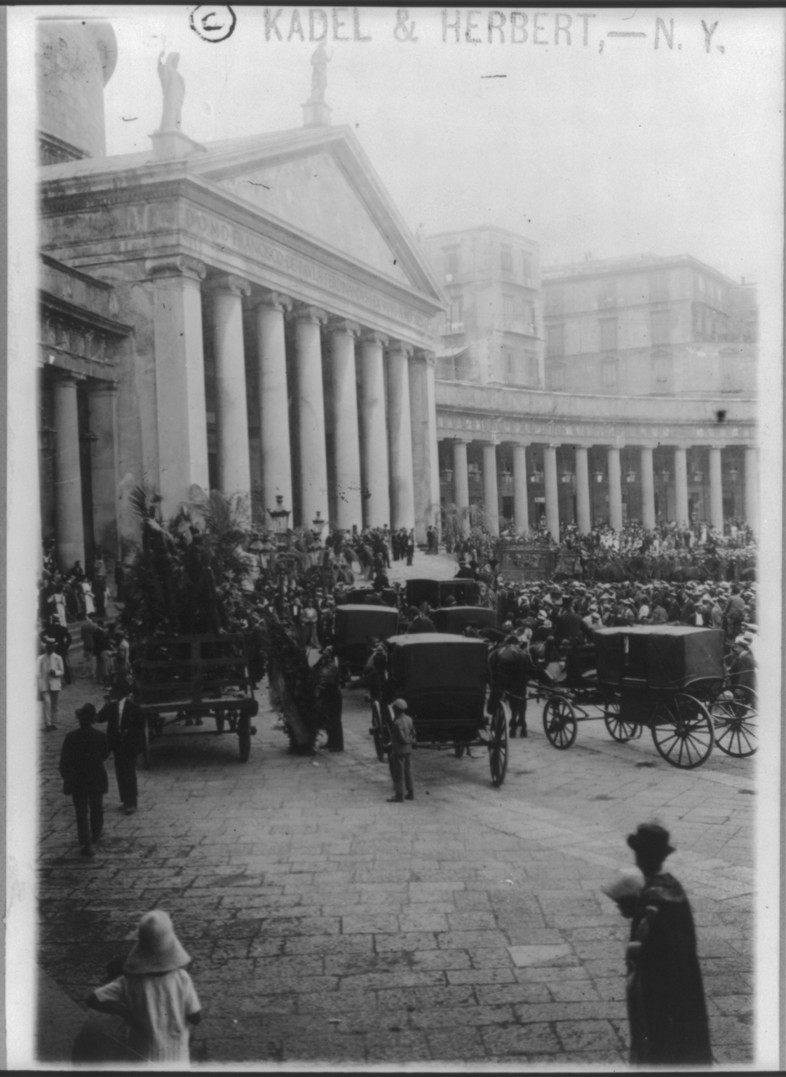 Enrico Caruso, 1873-1921, funeral at Church San Francisco de Paulo in Naples